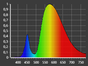 Spectre d'un spot à LED TC = 3135 K IRC = 65.9 Mesuré avec UPRtek MK350S